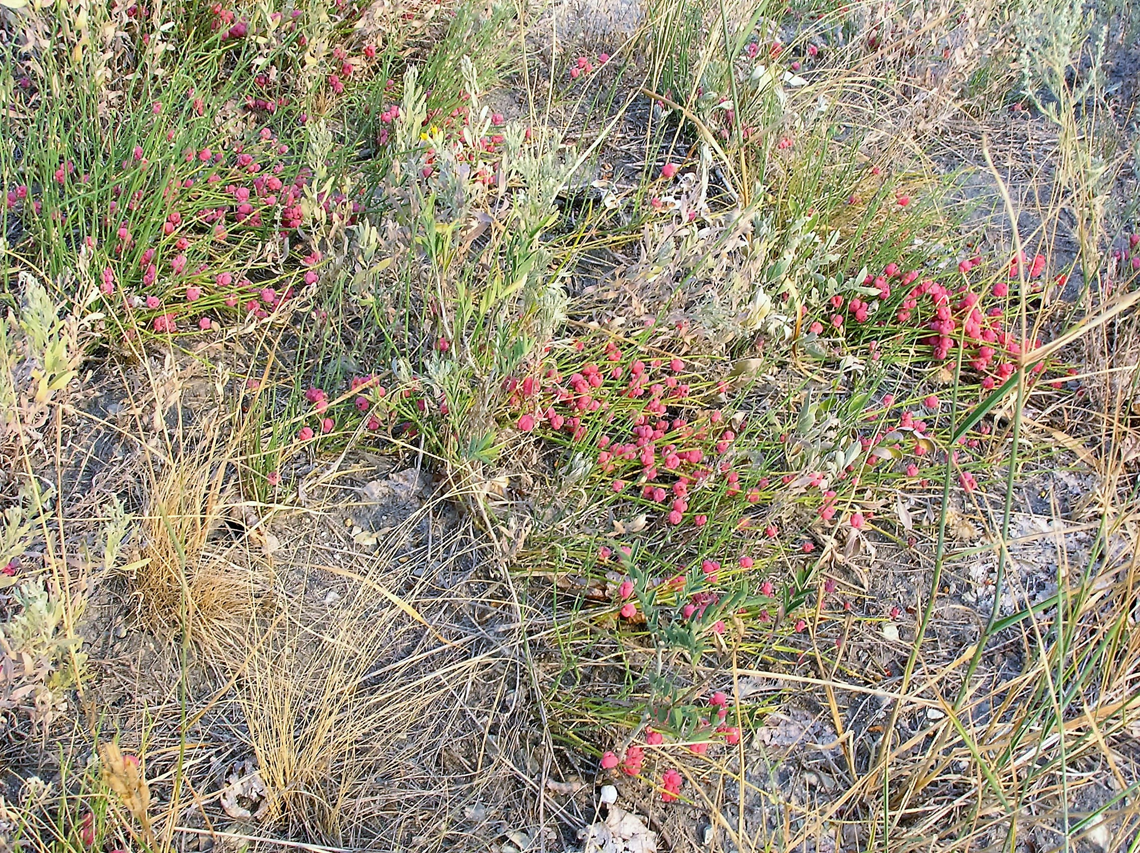 Ephedra distachya in habitat. Saratov Oblast, Russia.